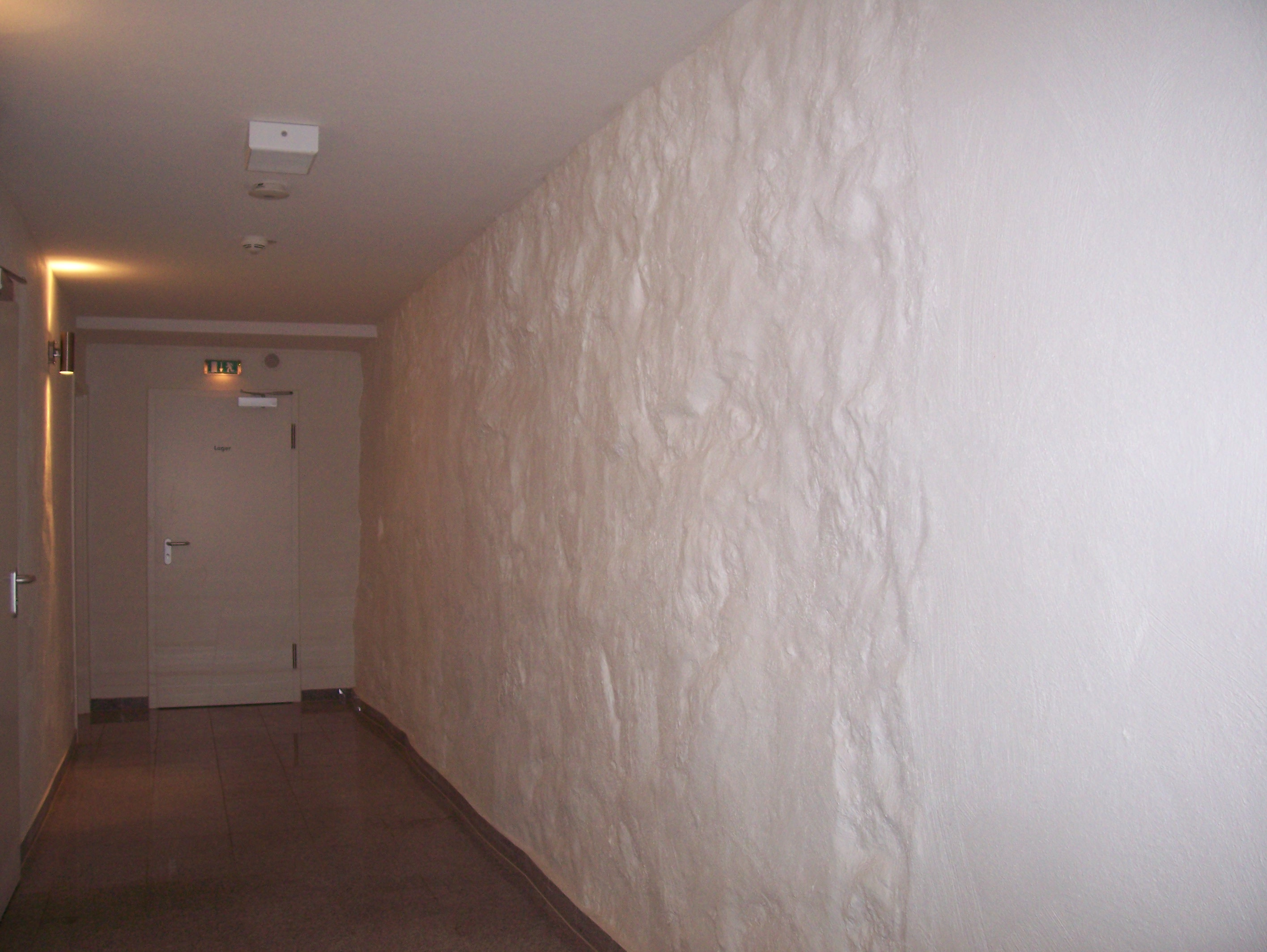 Prinzenpalais Bad Doberan - Wand mit teilweise sichtbaren Findingen im Kellergeschoss